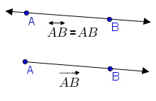 Полуправа како дел од права